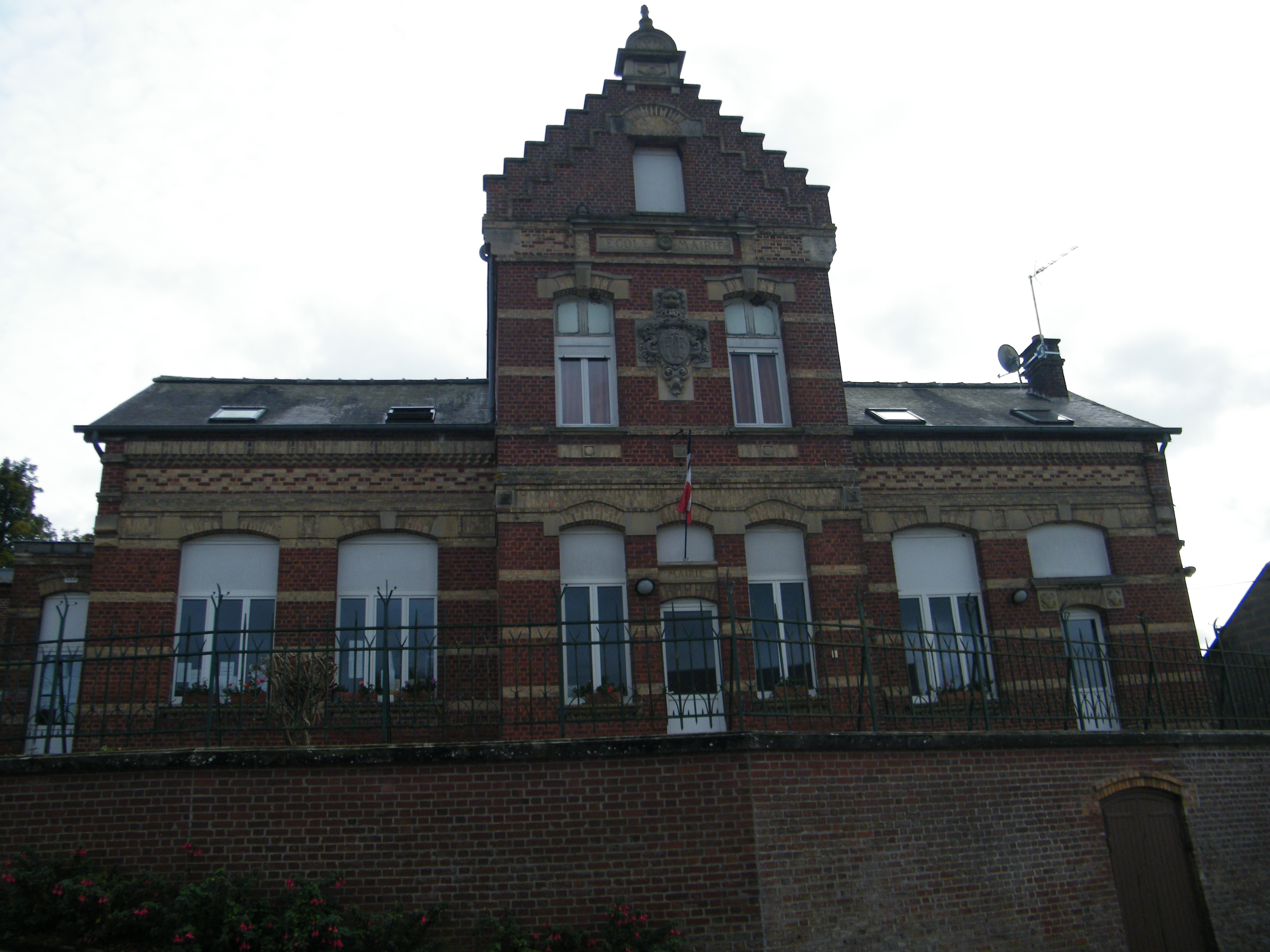 Mairie-école.